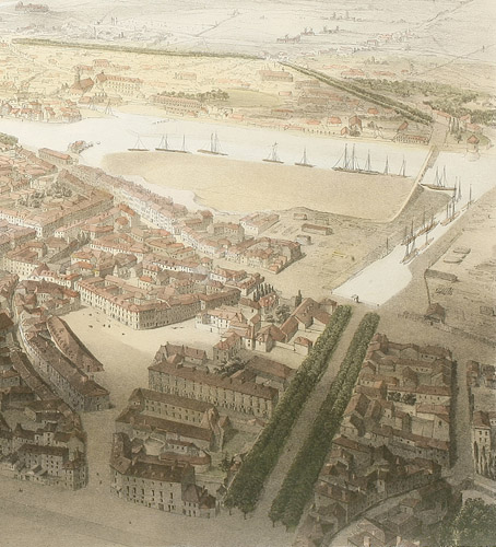 Le port Ayrault en 1848, détail de la lithographie d’Alfred Guesdon, « Angers ». Arch. mun. Angers, 2 Fi 336.